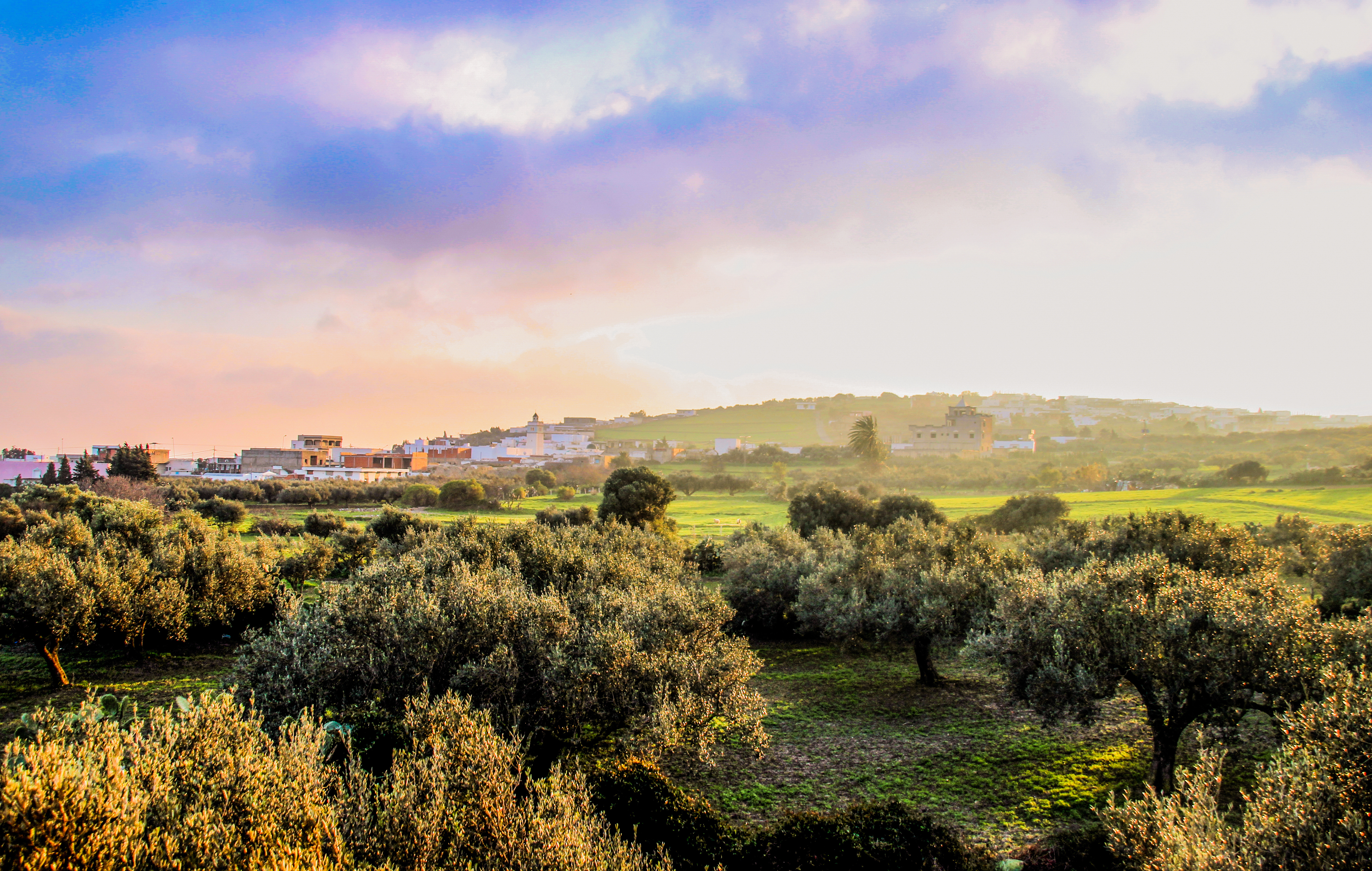 Djbal sidi Abderrahmen - Nabeul